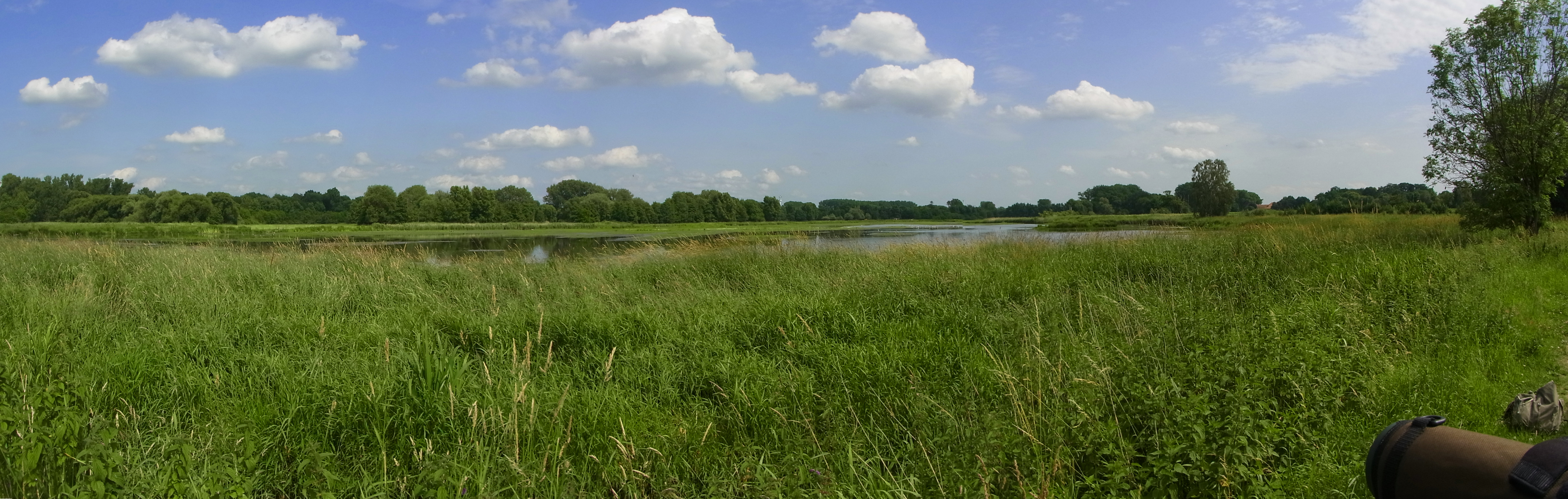 Eingestaute „Schwarzfläche“ im Naturschutzgebiet Braunschweiger Okeraue bei Braunschweig in Niedersachsen, Ende Juni